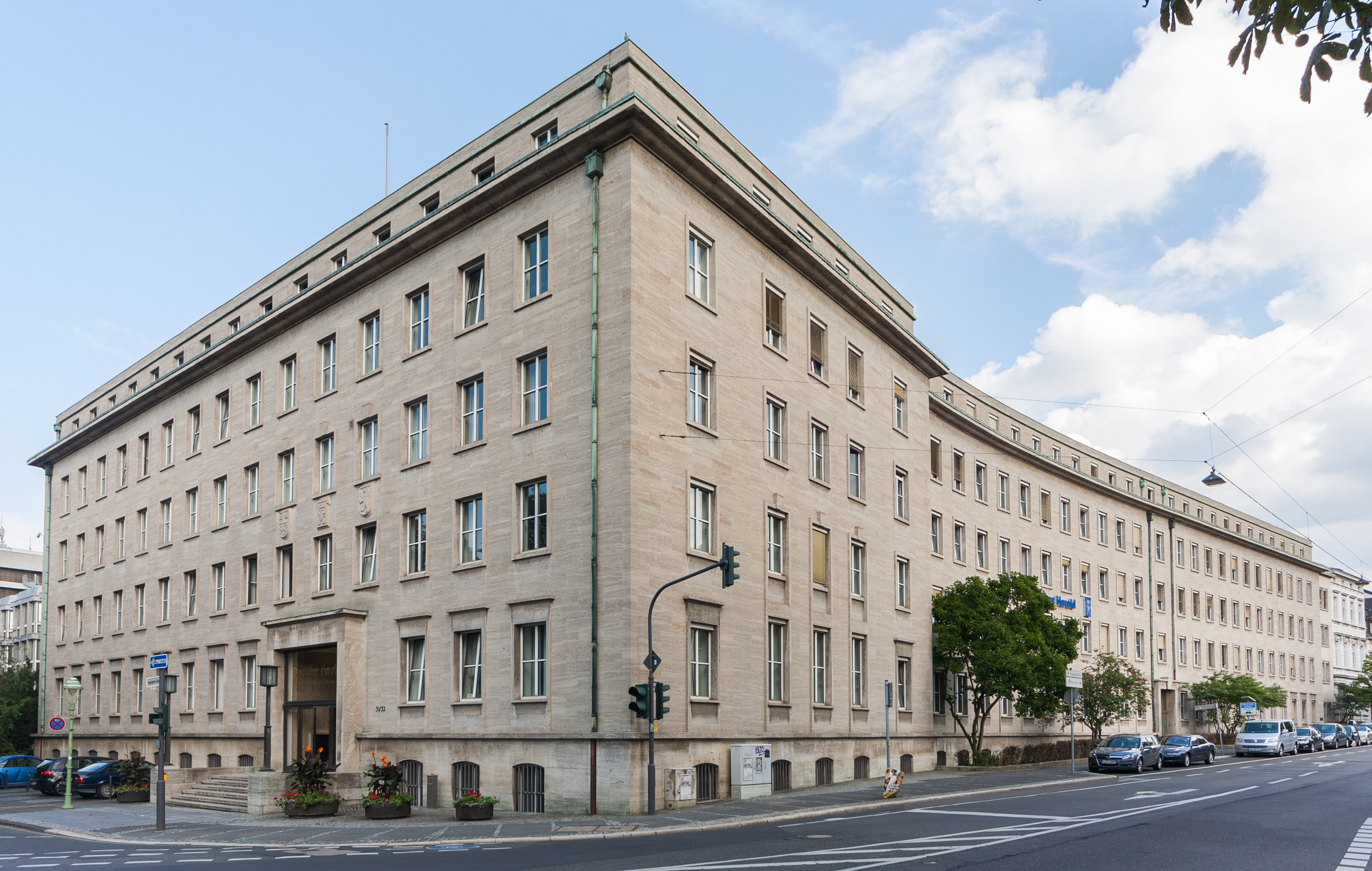 Hauptverwaltungsgebäude Deutscher Herold, Poppelsdorfer Allee 31–33 (Ecke Bonner Talweg), Bonn-Südstadt – neoklassizistischer Bau aus den Jahren 1949/50